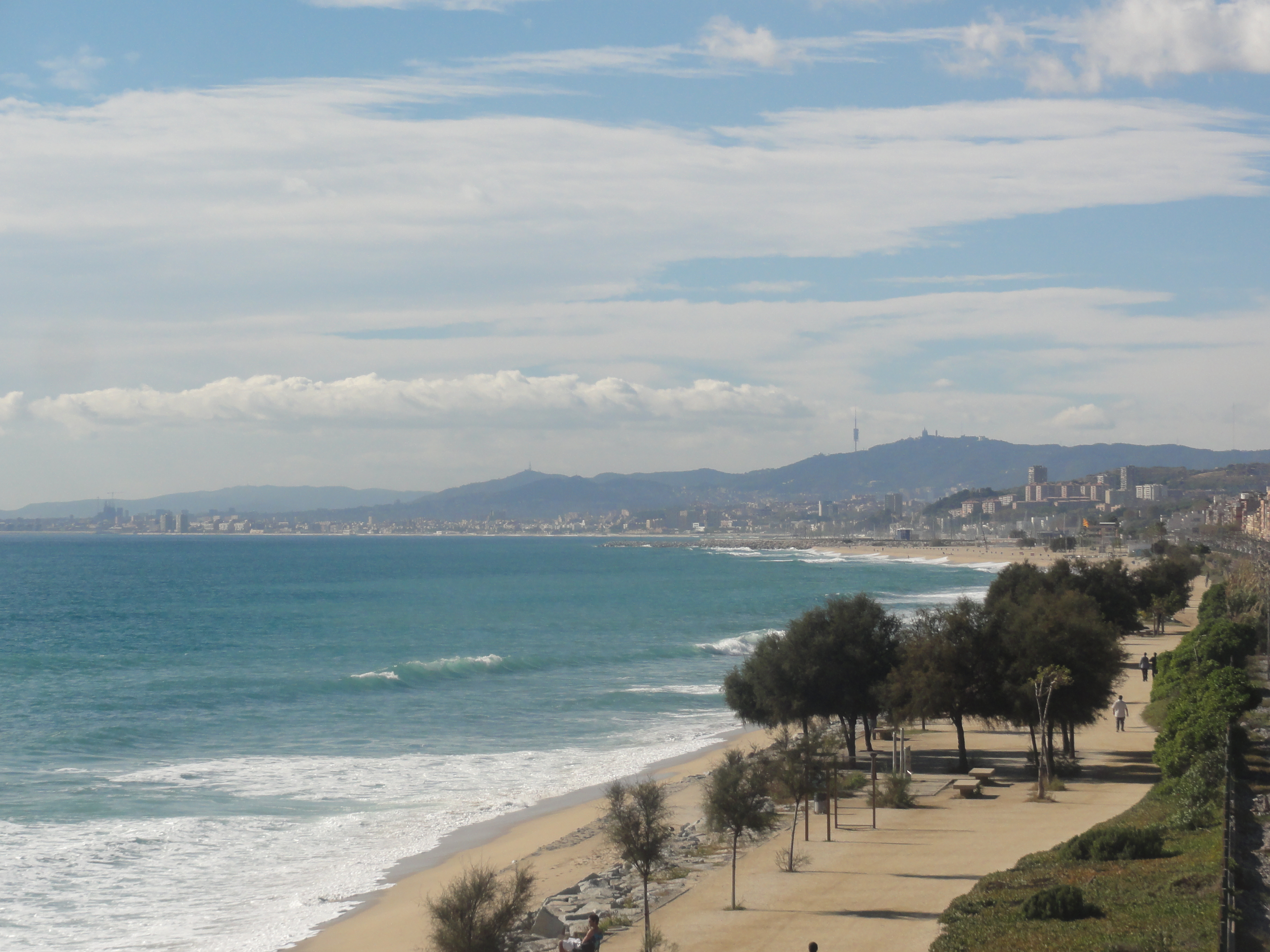 Platja del Masnou This is a a photo of a beach in Catalonia, Spain, with id: PL-CT-17003-1332